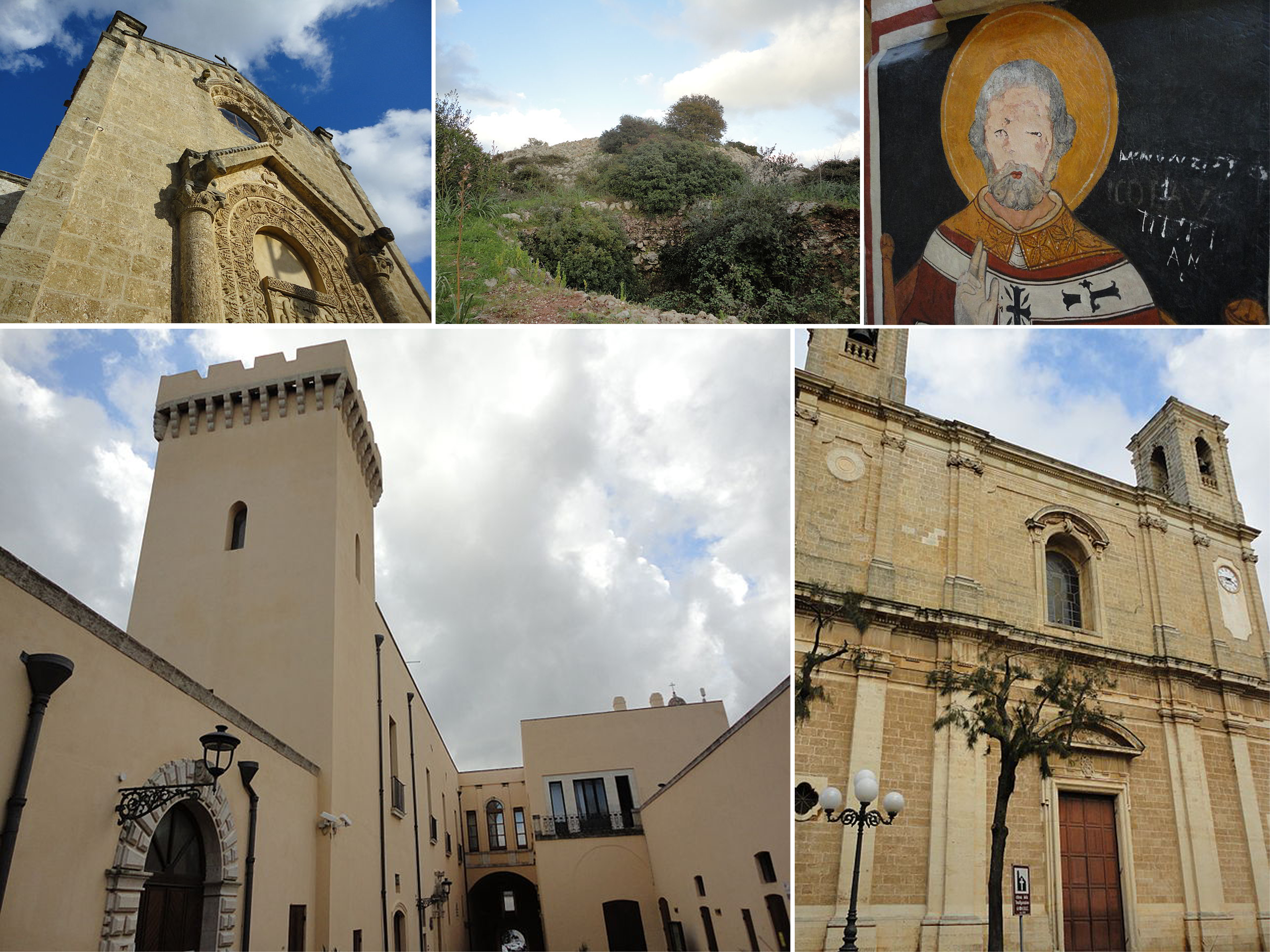 Collage Taurisano